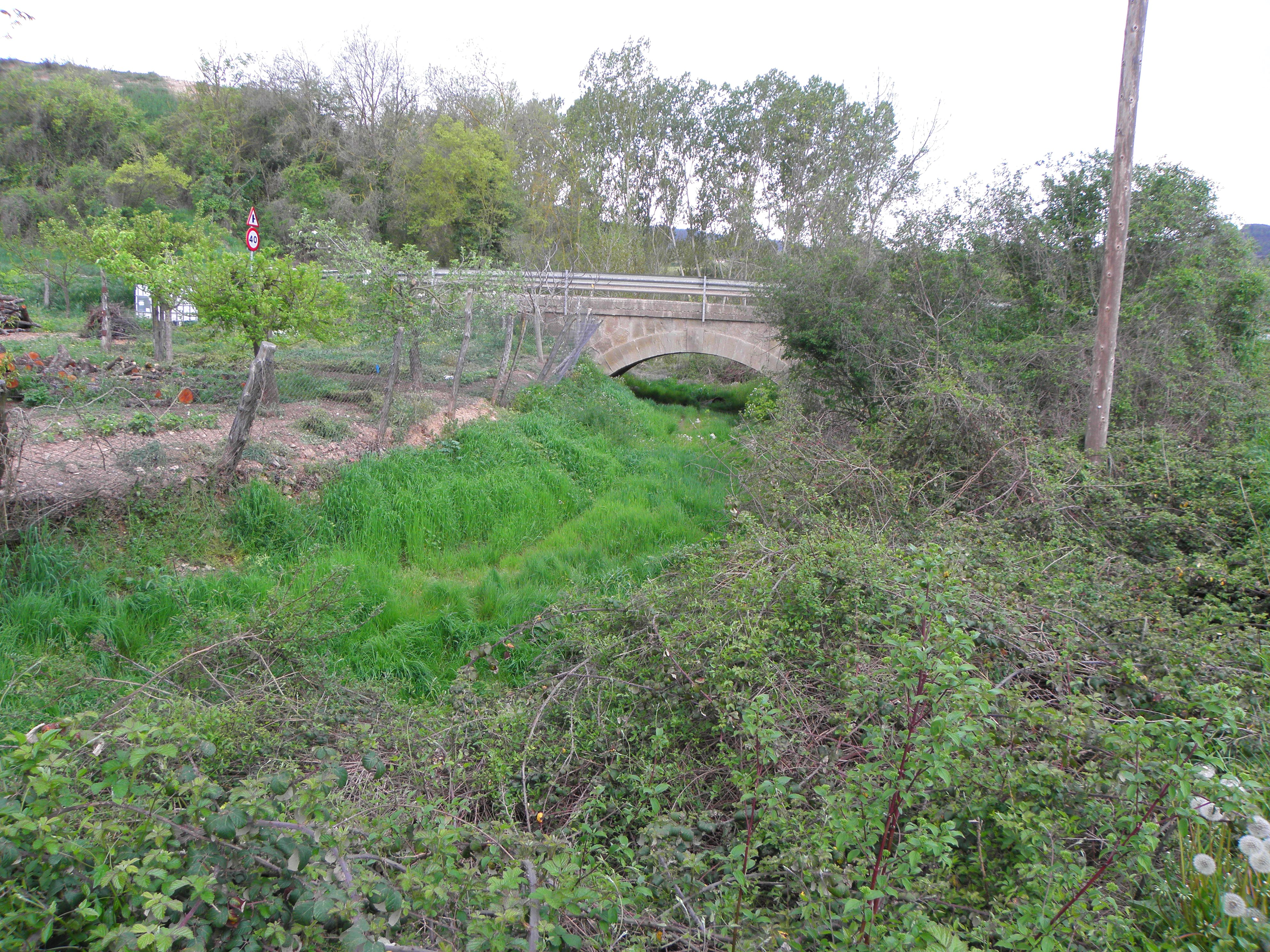 El barranc de Ribalta travessant la carretera LV-3005 de Solsona a Torà al pont de la Canal (Solsona, Solsonès)